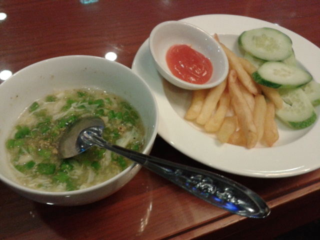 Một tô súp cua bên cạnh đĩa khoai tây chiên. Ảnh tự chụp bằng điện thoại di động và tải lên Wiki